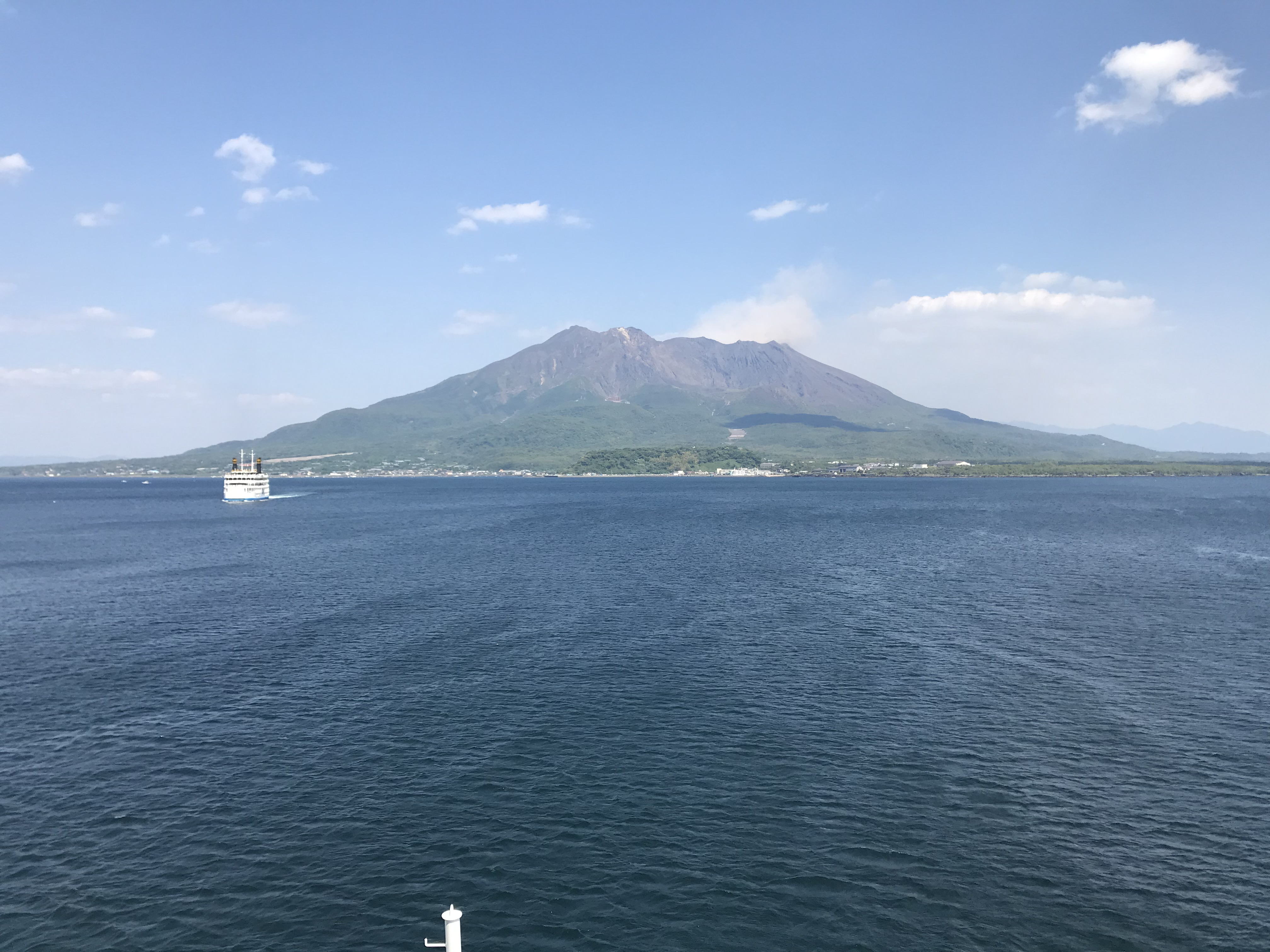 桜島フェリー・桜島丸より望む桜島